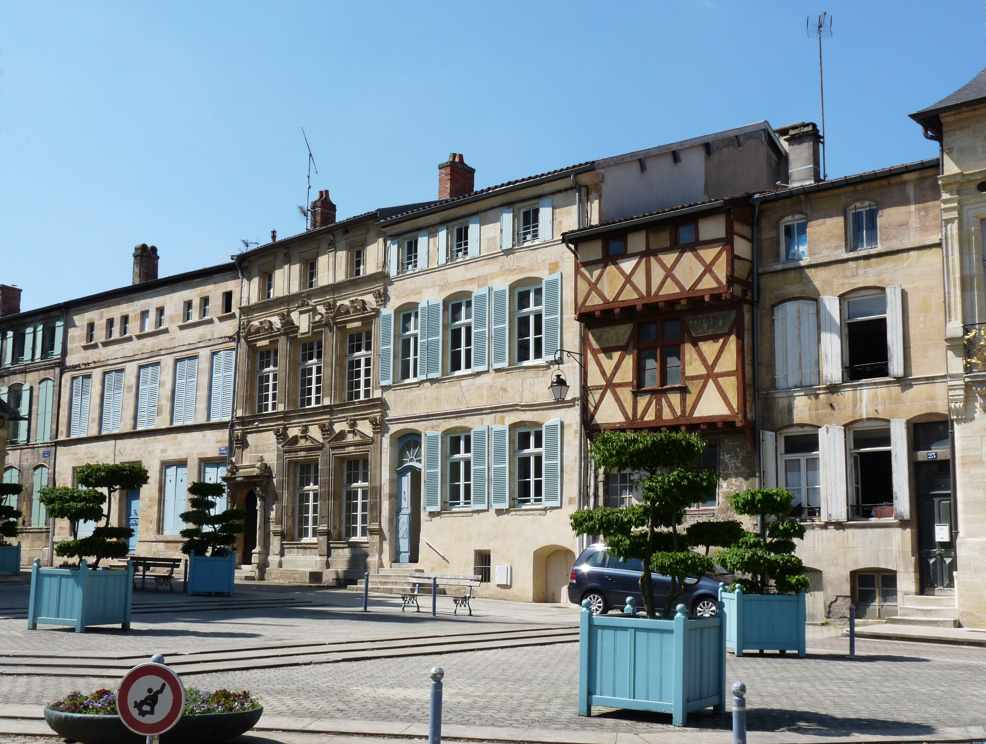 Place Saint-Pierre à Bar-le-Duc (Meuse), dans le Quartier Renaissance de la Ville Haute. Plusieurs immeubles classés par les Monuments historiques, dont les n° 29 et 25.